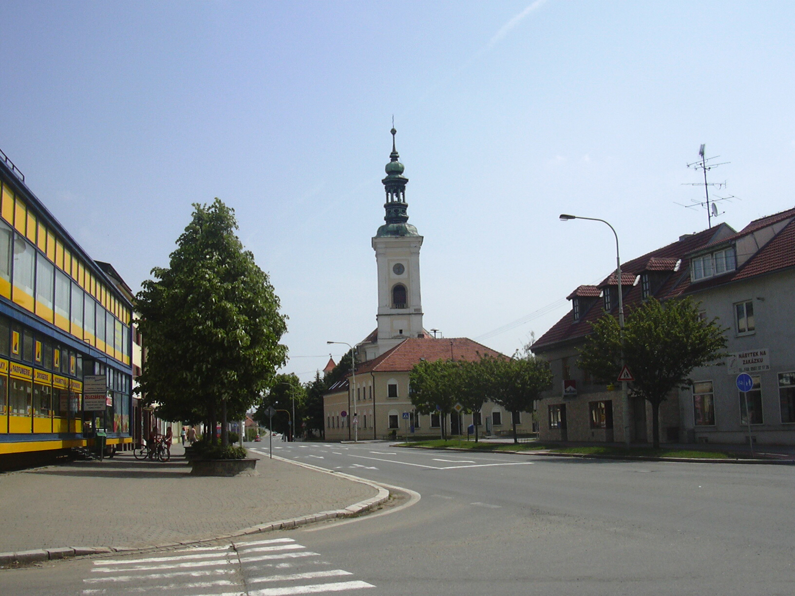 Filiální kostel svaté Maří Magdalény (Rousínov, Vyškov District, Czech Republic)